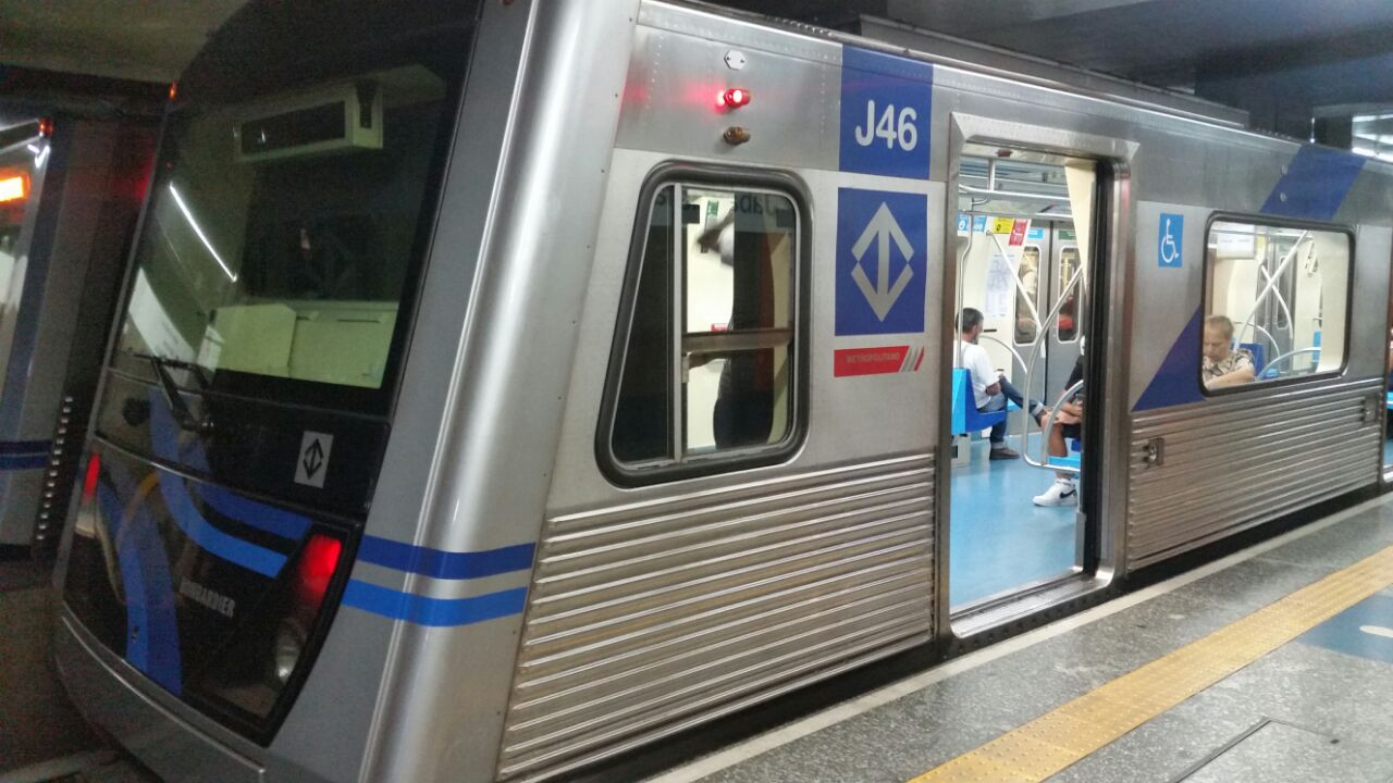 Trem da frota J (J46) na Estação Jabaquara.